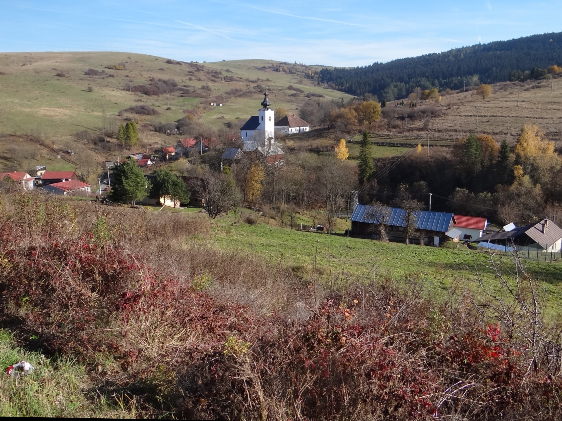 Kremná